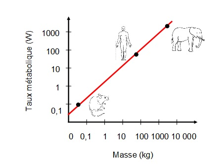 On observe une augmentation du taux métabolique en fonction de la masse de l'organisme.